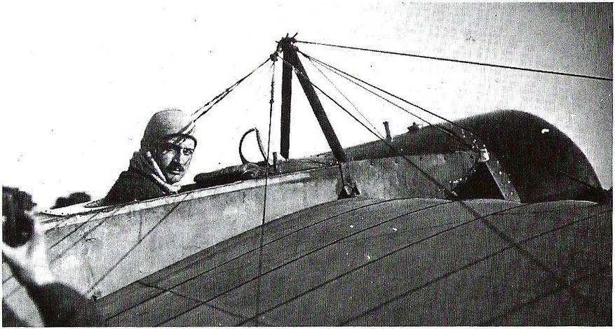 Roland Garros le 28 septembre 1913 lors de la Grande Semaine d'Aviation de la Champagne (1913) .